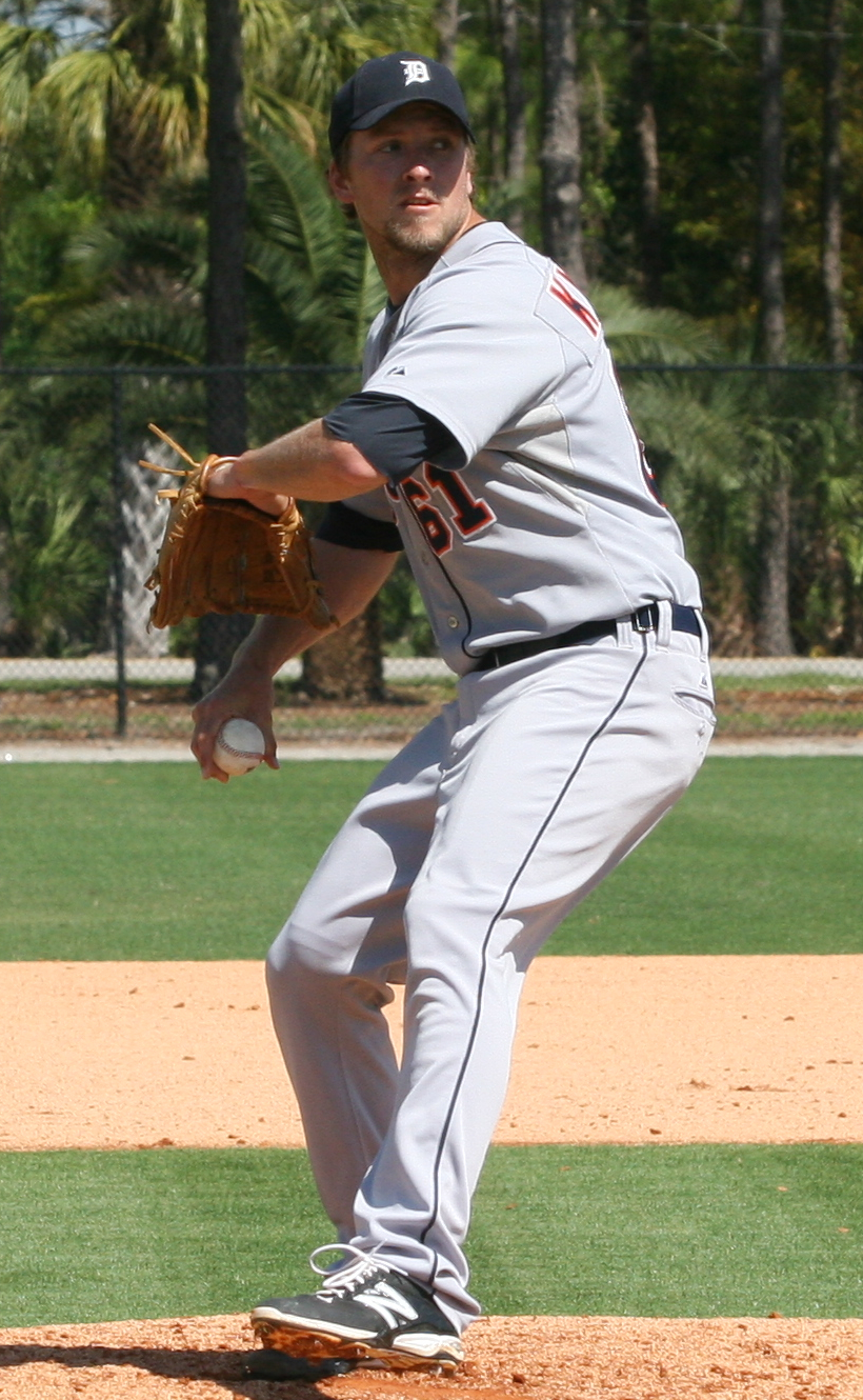 Guido Knudson